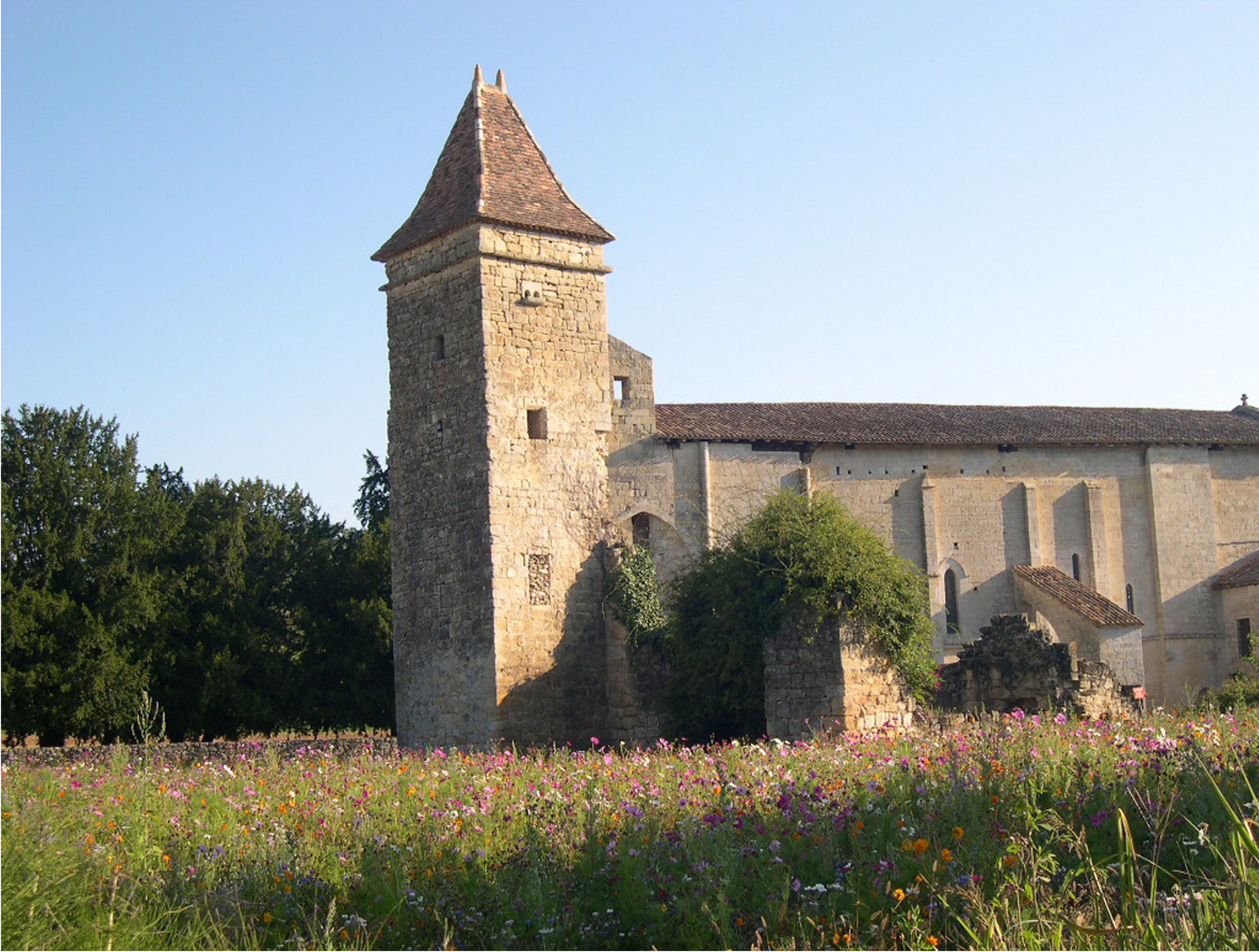 L'abbaye de Blasimon